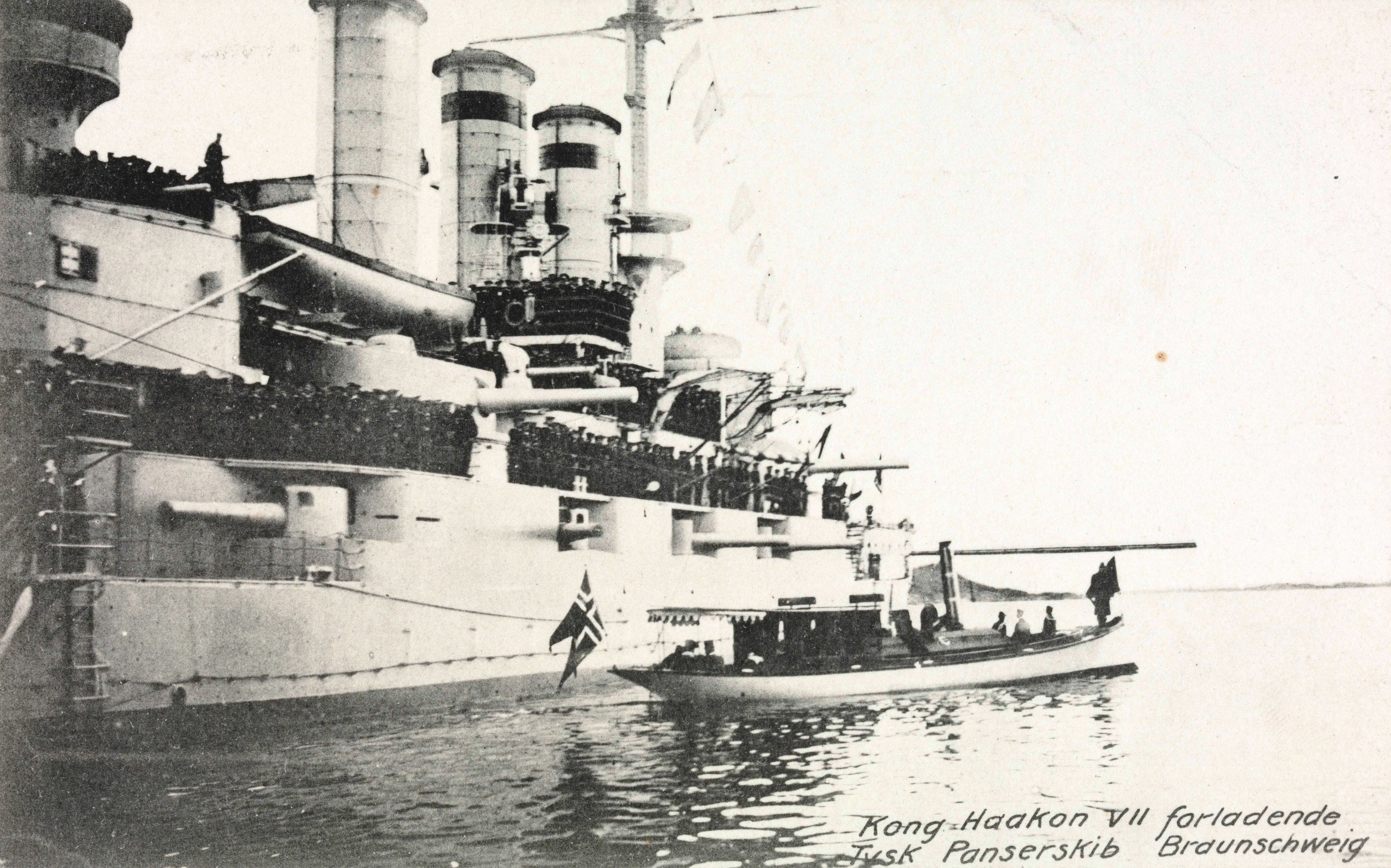 Bildet er hentet fra Nasjonalbibliotekets bildesamling Oslofjorden, Oslo, Oslo